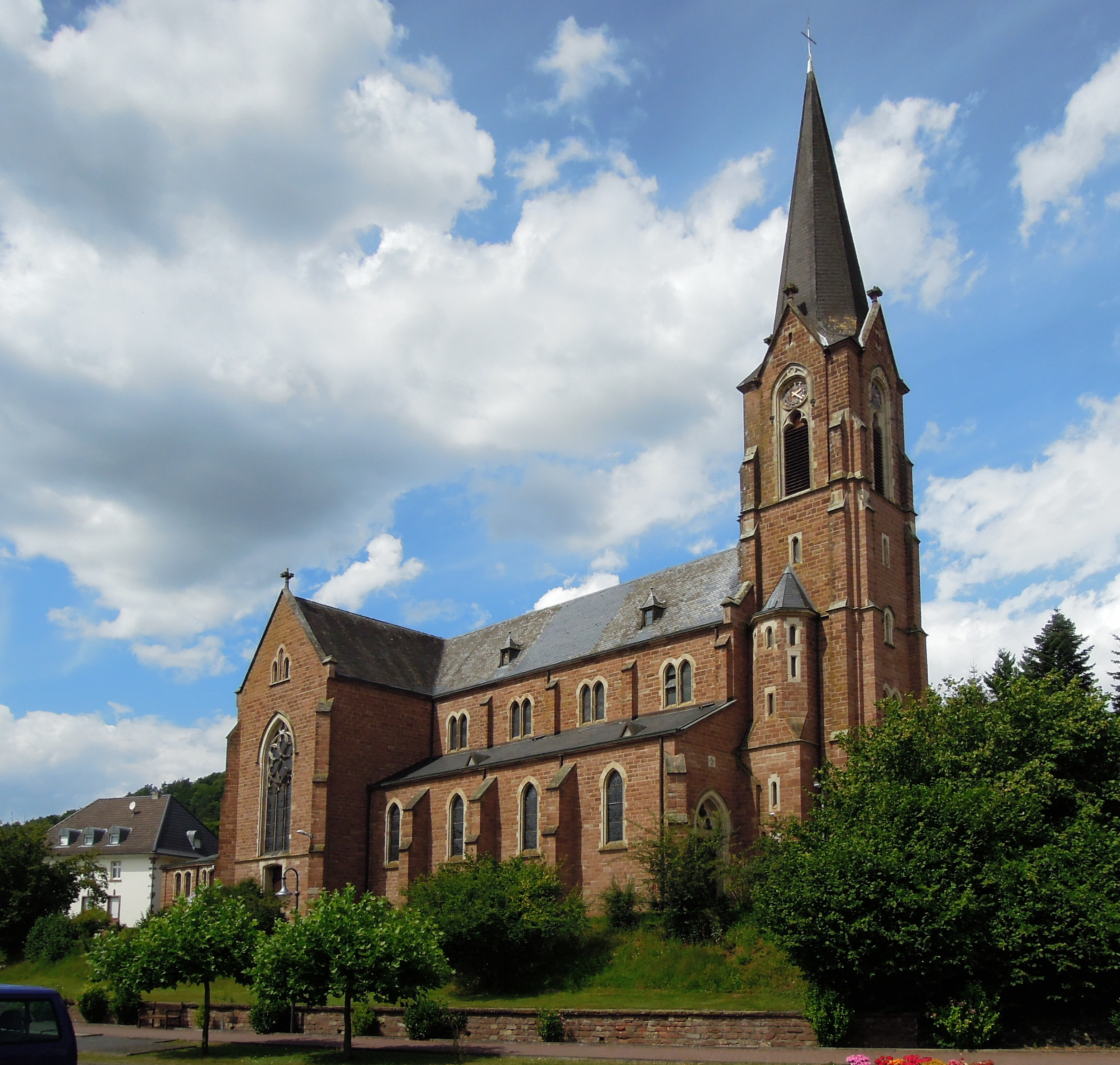 Reimsbacher Straße, kath. Pfarrkirche St. Andreas und Mariae Himmelfahrt, 1898–1901 von Wilhelm Hector (Einzeldenkmal)